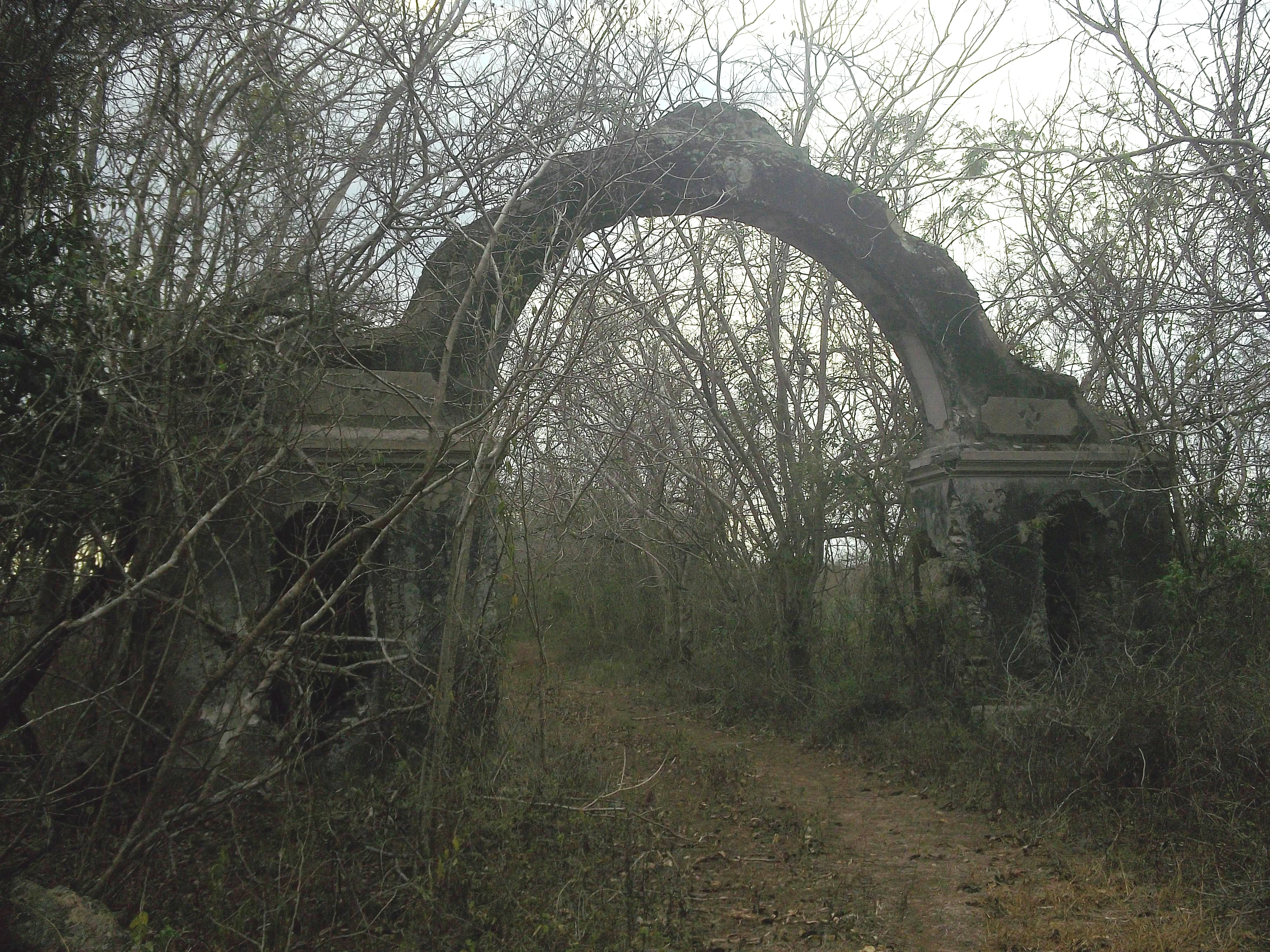 Arco de Santa Bárbara, Yucatán.